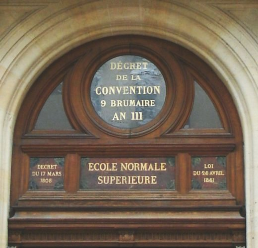 Lunette de la porte d'entrée de l'École normale supérieure de la rue d'Ulm, 45 rue d'Ulm, Paris.